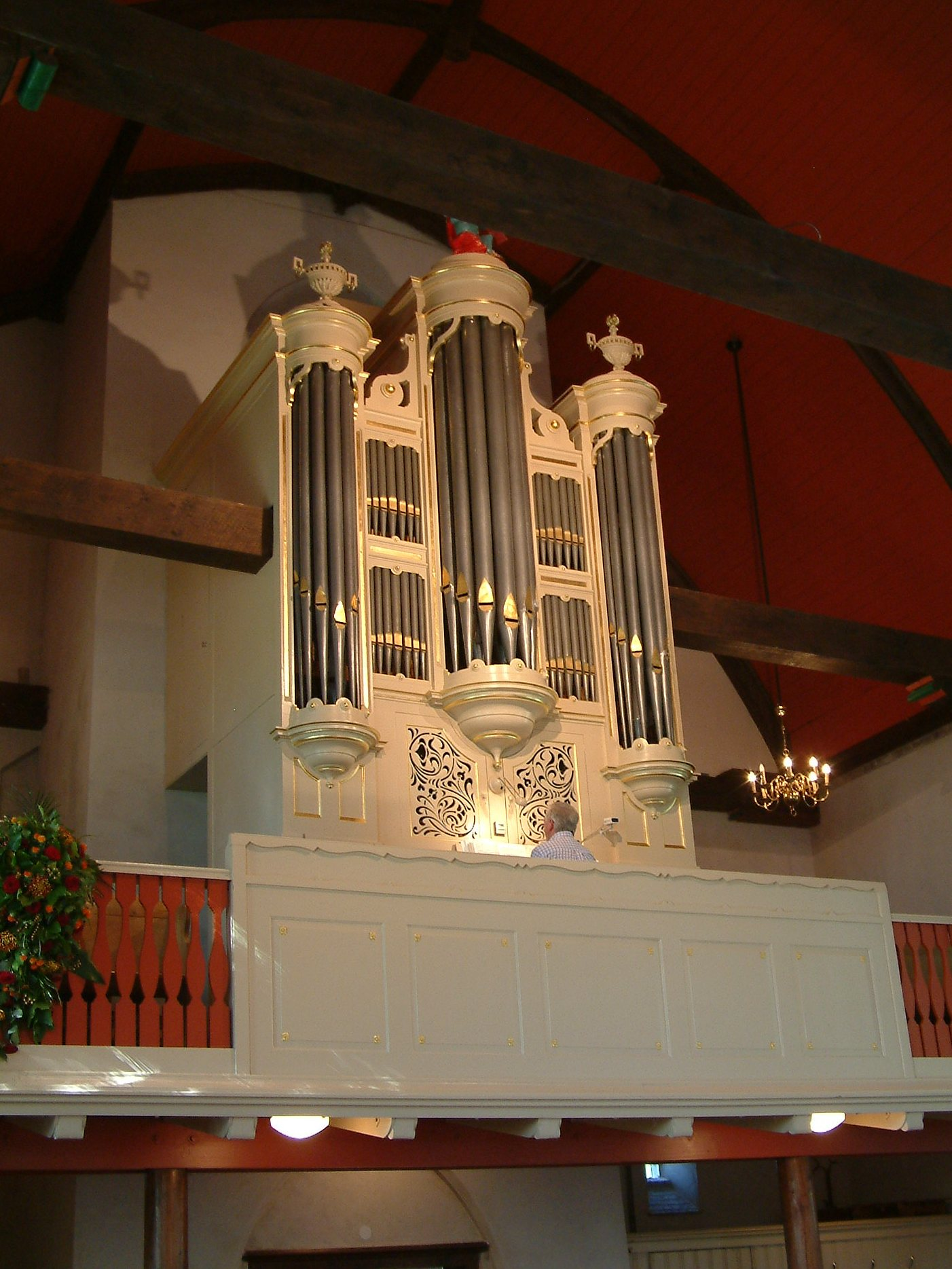 Hervormde kerk van Rhoon Orgel